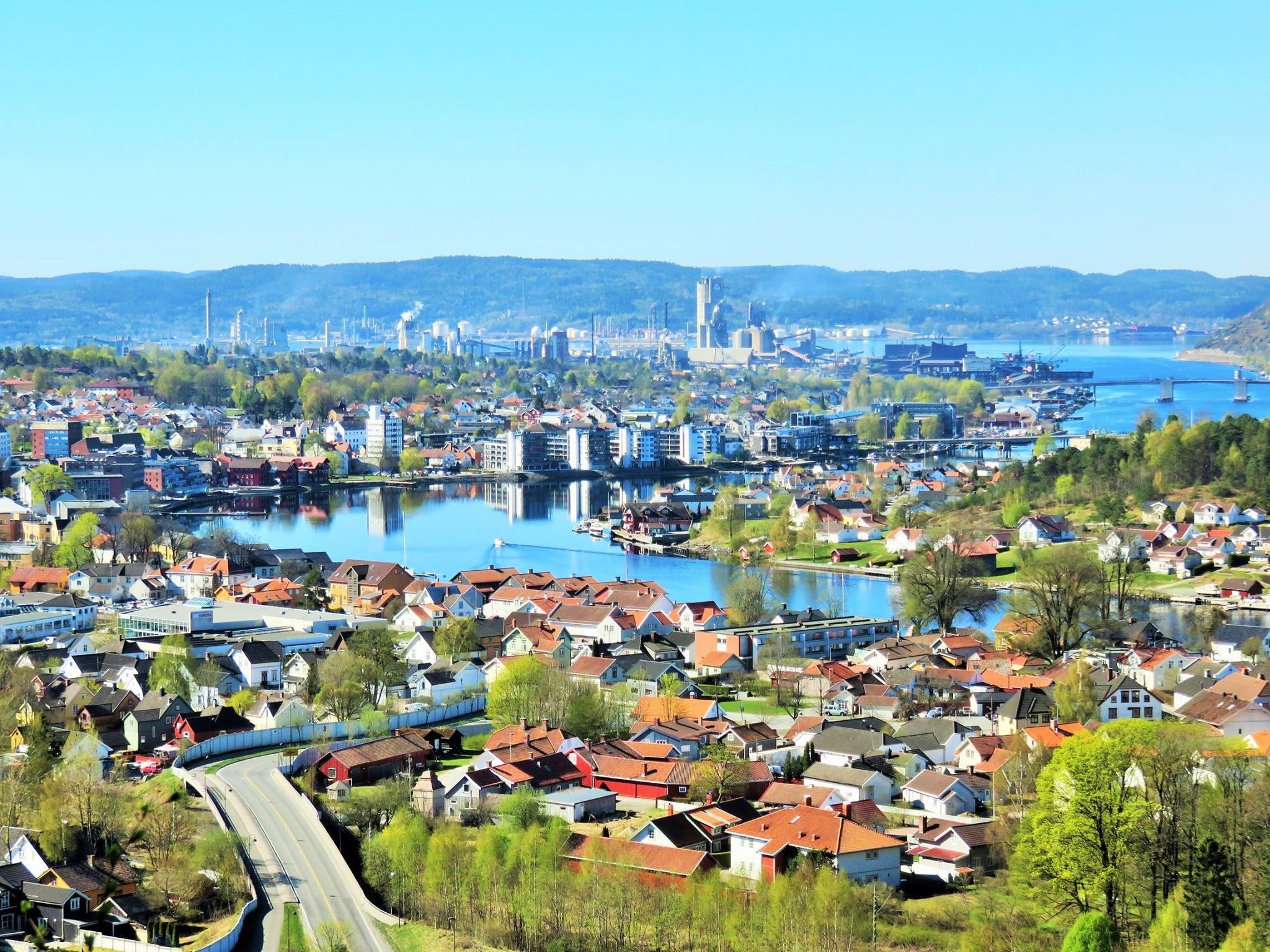 Porsgrunn Foto: Lars Iver Larsen